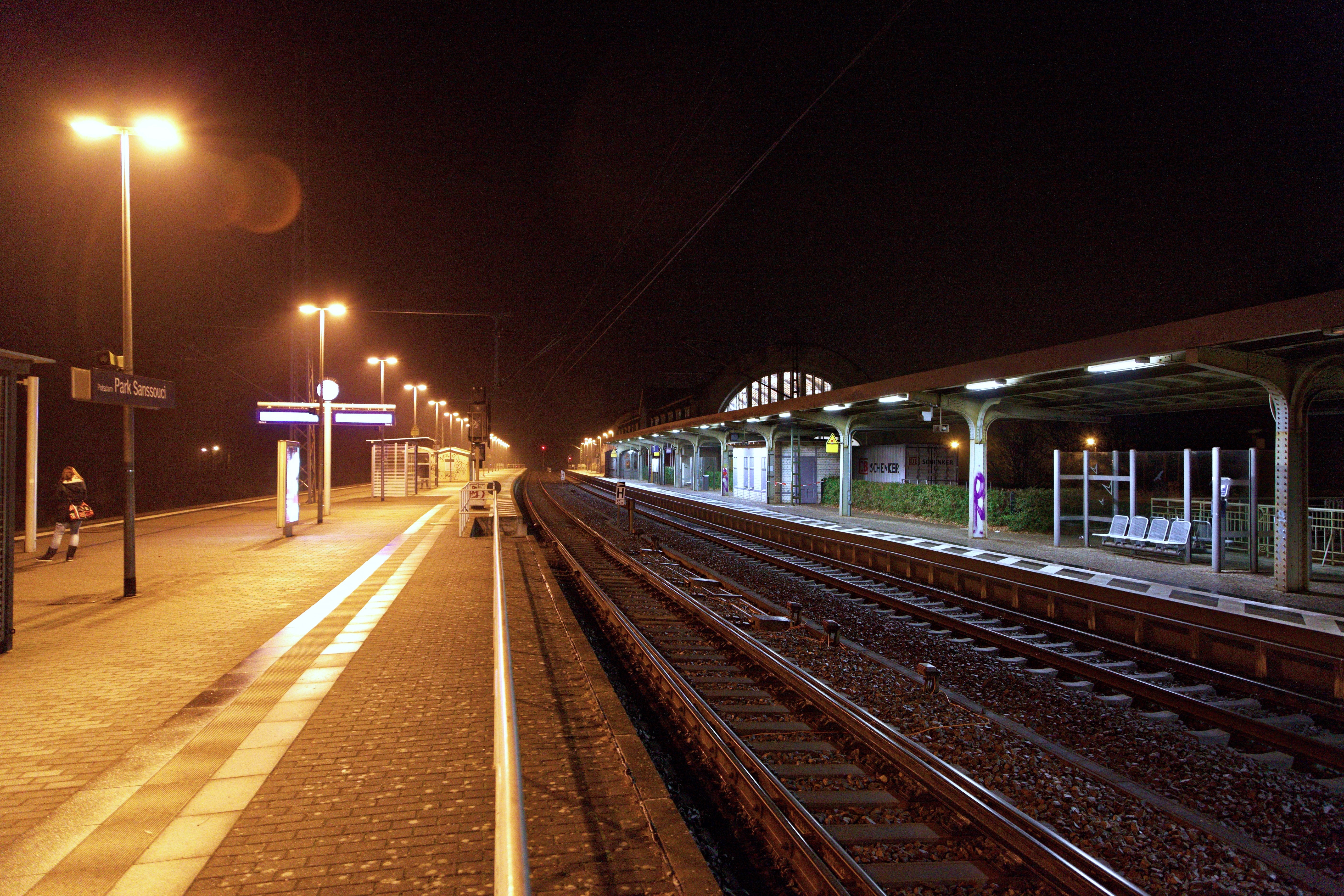 Bahnhof Potsdam Park Sanssouci im Herbst